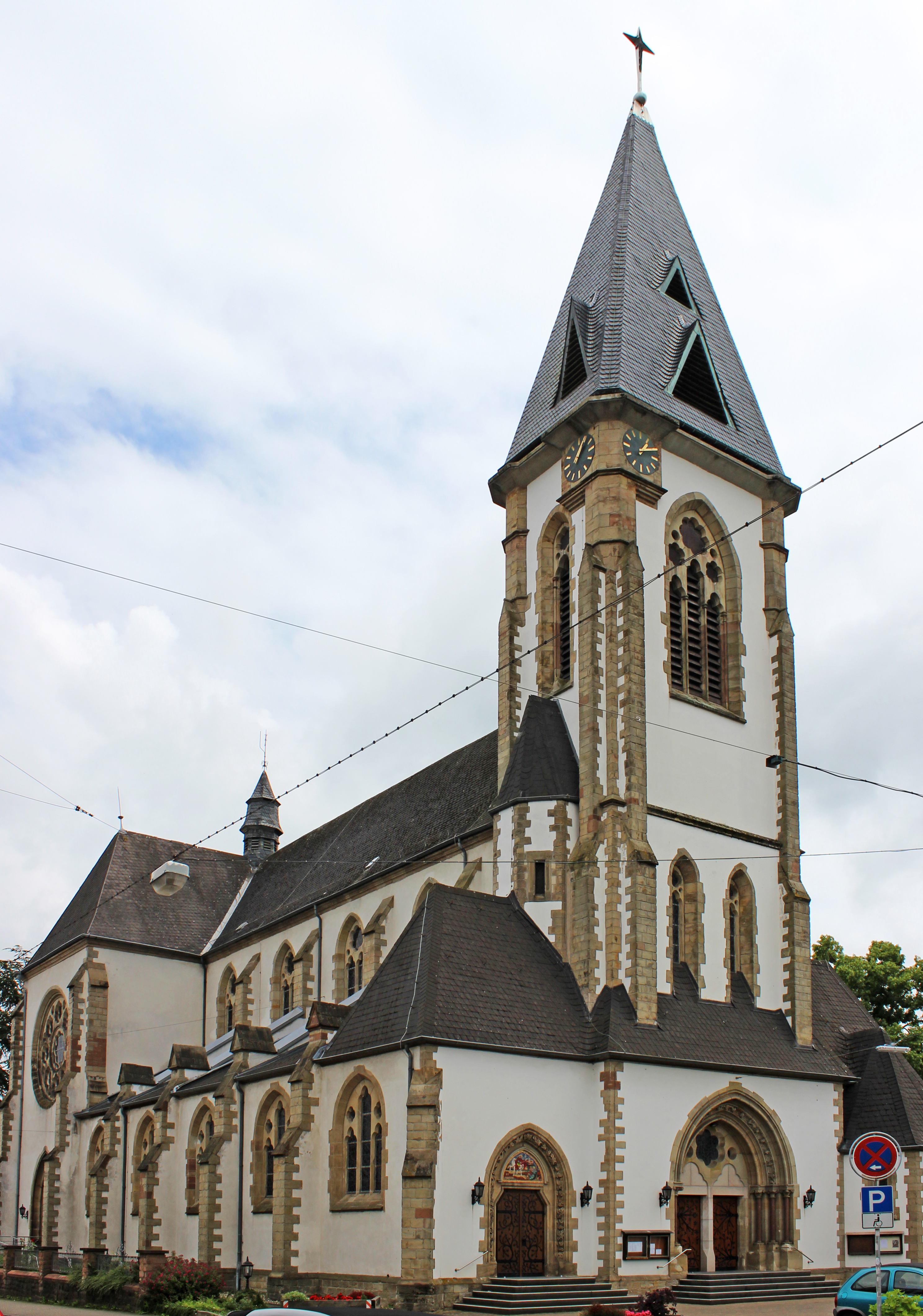 Die katholische Pfarrkirche St. Martin in Schwalbach, Landkreis Saarlouis, Saarland